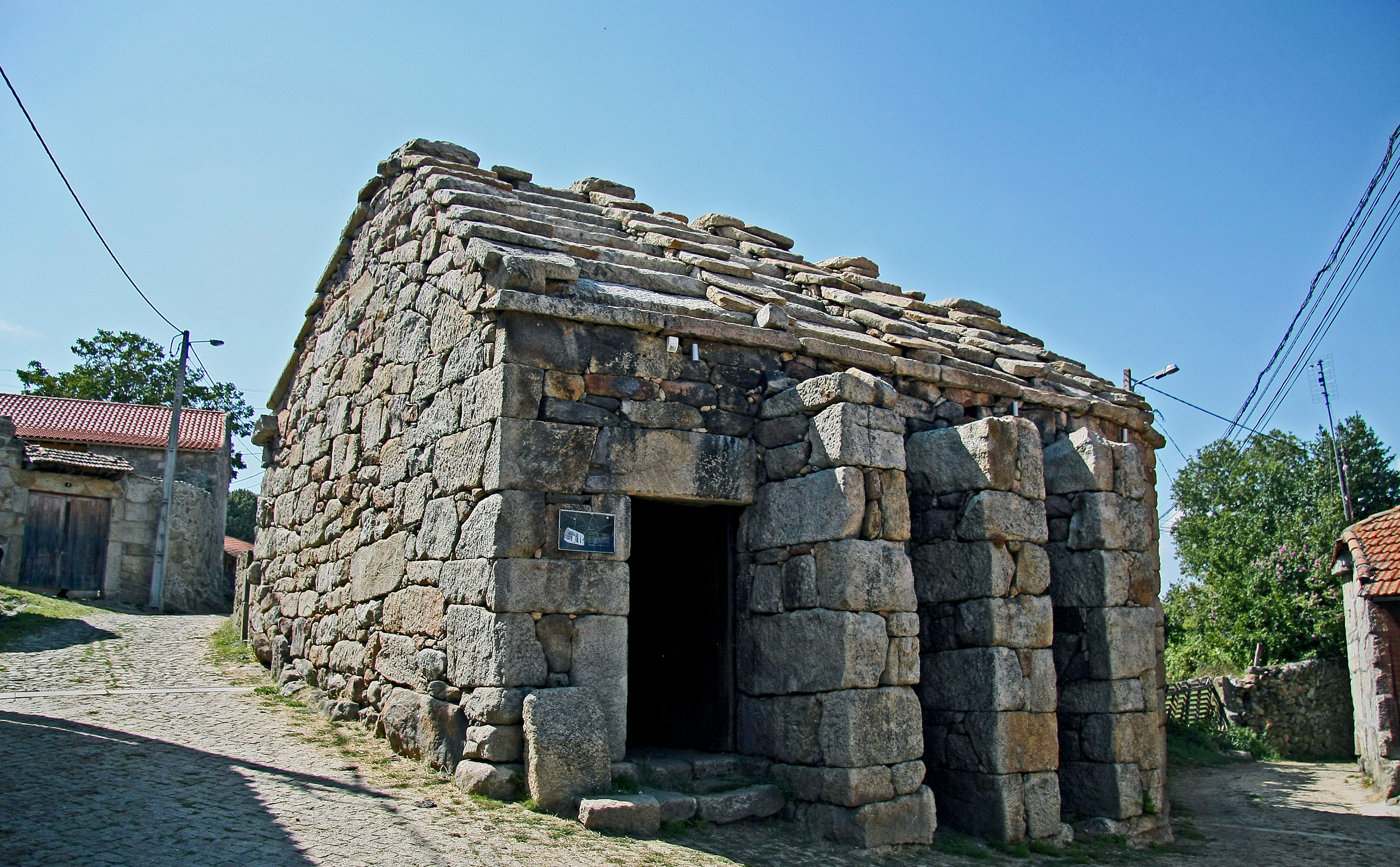 O Forno comunitário de Tourém é um forno comunitário português localizado na localidade e freguesia de Tourém, concelho de Montalegre, no Distrito de Vila Real e remonta a 1868. Trata-se de uma construção que tem por base uma planta sub-rectangular e uma cobertura de telhado de duas águas composto por lajes de granito. A estrutura é reforçada por contrafortes de pedra de cantaria na parte exterior e de secção rectangular que sustentam os três arcos de volta perfeita, do interior, que sustentam a cobertura. Na ombreira de um nicho interior possui desenhado na pedra a data de 1868, embora o tipo de arquitectura desta construção permita afirmar que a mesma é mais antiga. A porta de entrada foi aberta entre o cunhal do edifício e o primeiro contraforte, e apresenta uma verga recta. Na frente do edifício, junto à entrada, existe, encostada às paredes, uma banca de tender o pão de grandes proporções, em pedra maciça com um frontal em alvenaria. Do lado direito da construção e sobre uma plataforma (lar) encontra-se o forno propriamente dito que tem uma câmara em pavimento de lajes e tecto abobadado. See where this picture was taken. [?]